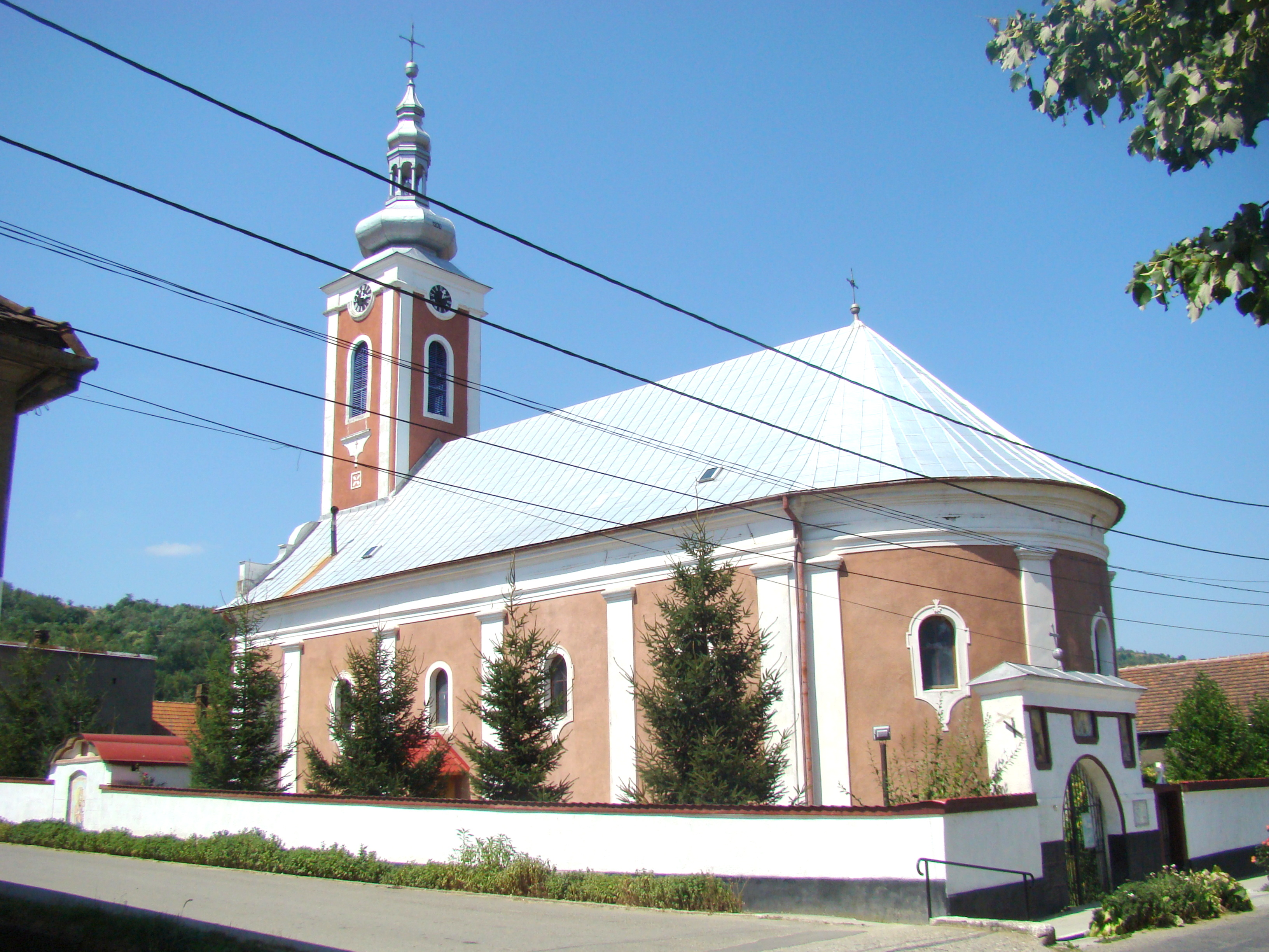 Biserica „Sfântul Dumitru”, sat Teregova; comuna Teregova